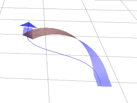 plane's manuva:Barrel Roll